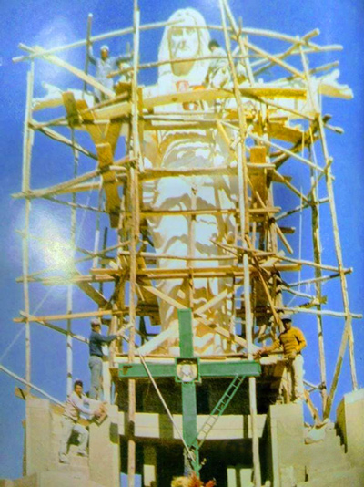 Construcción e implementación del Cristo Blanco en el Cerro Huaynarroque de la ciudad de Juliaca en 1987